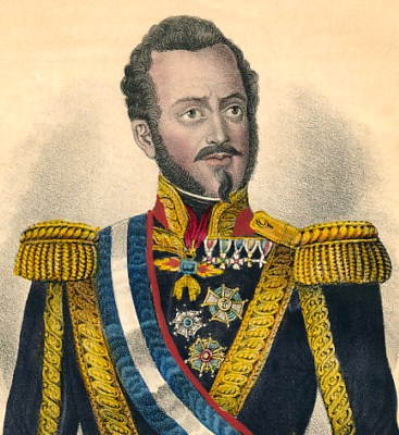 Grabado alemán del militar progresista